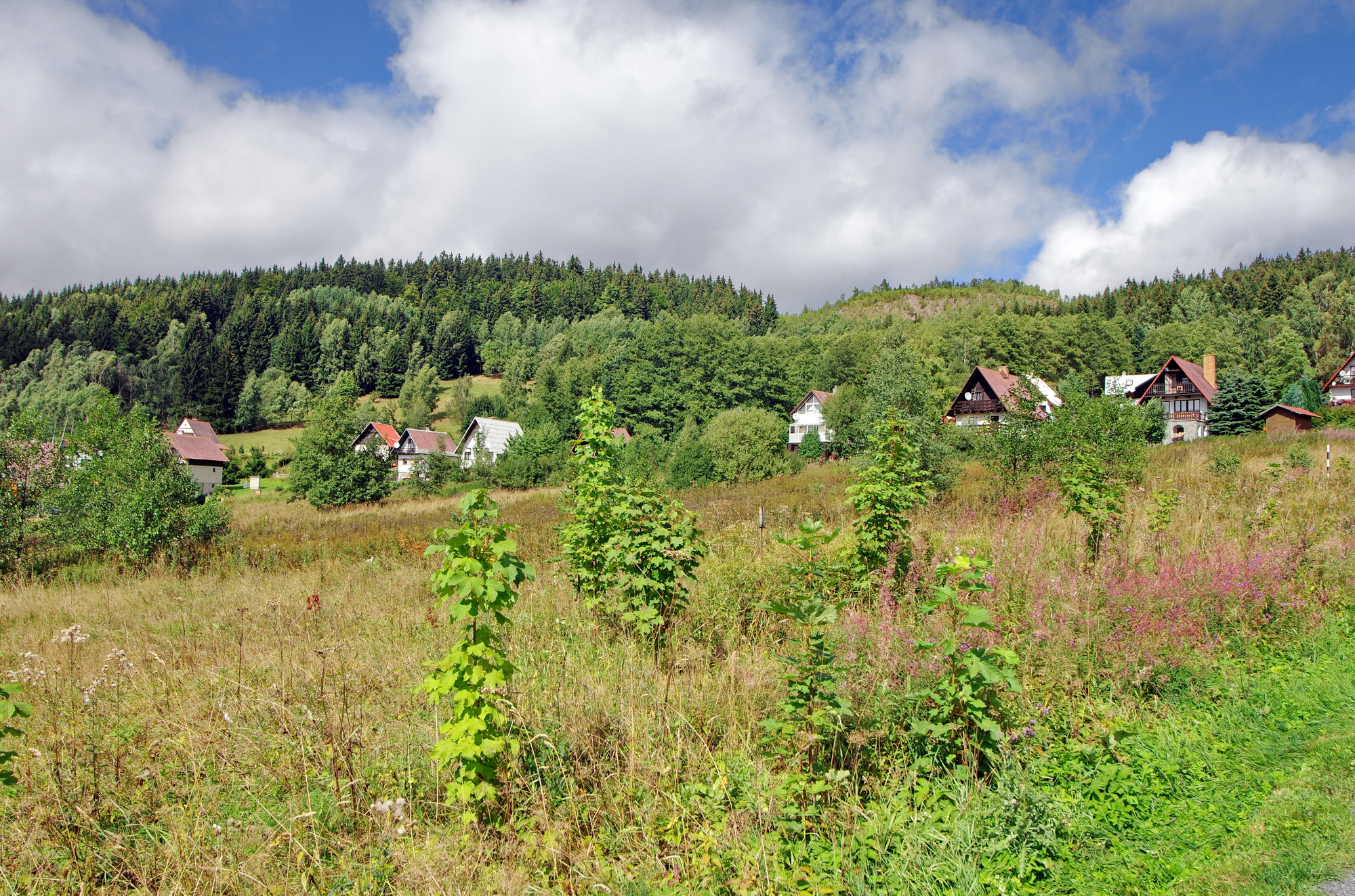 Mariánská, část města Jáchymov, Krušné hory, okres Karlovy Vary